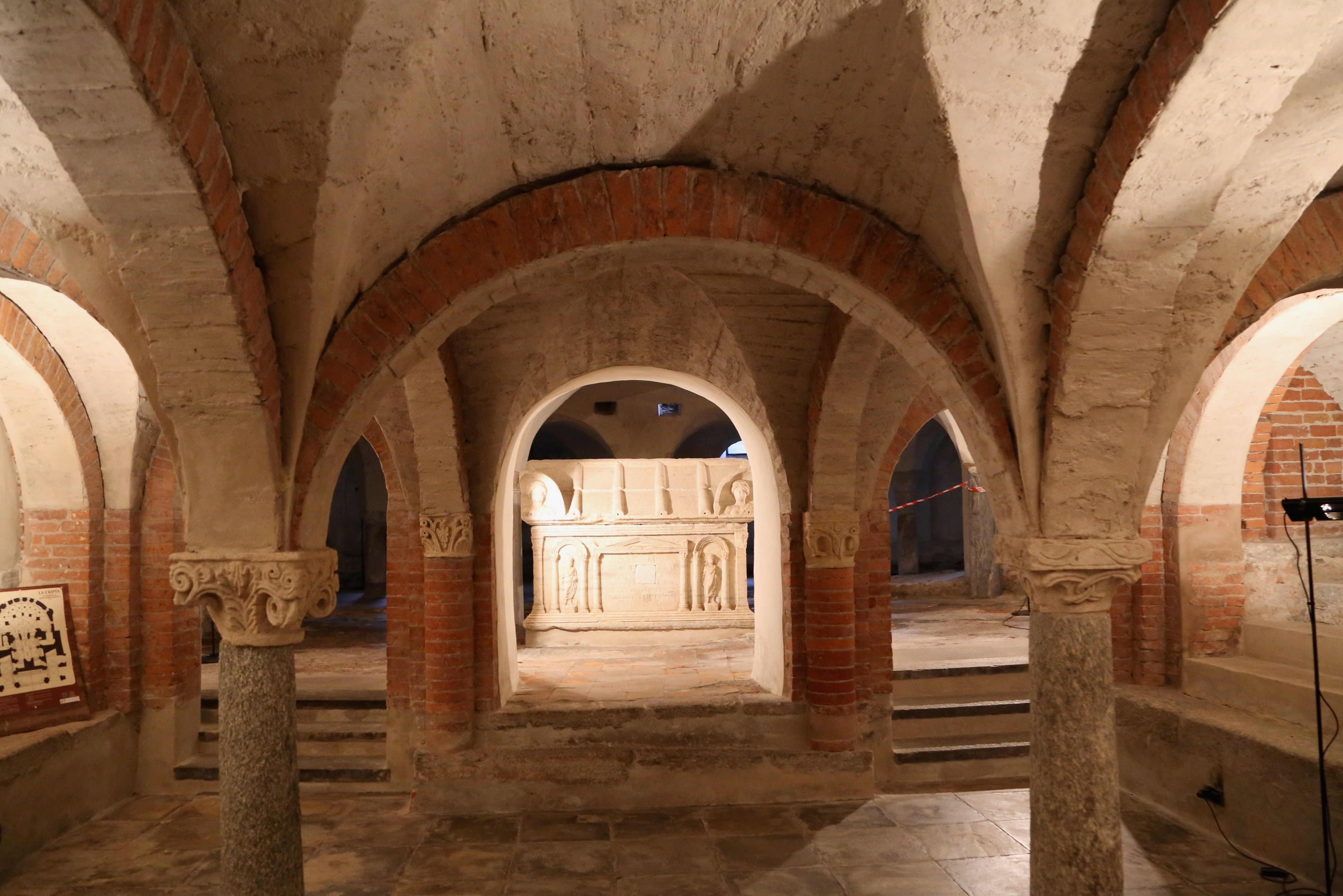 Duomo, Ivrea, Piemont